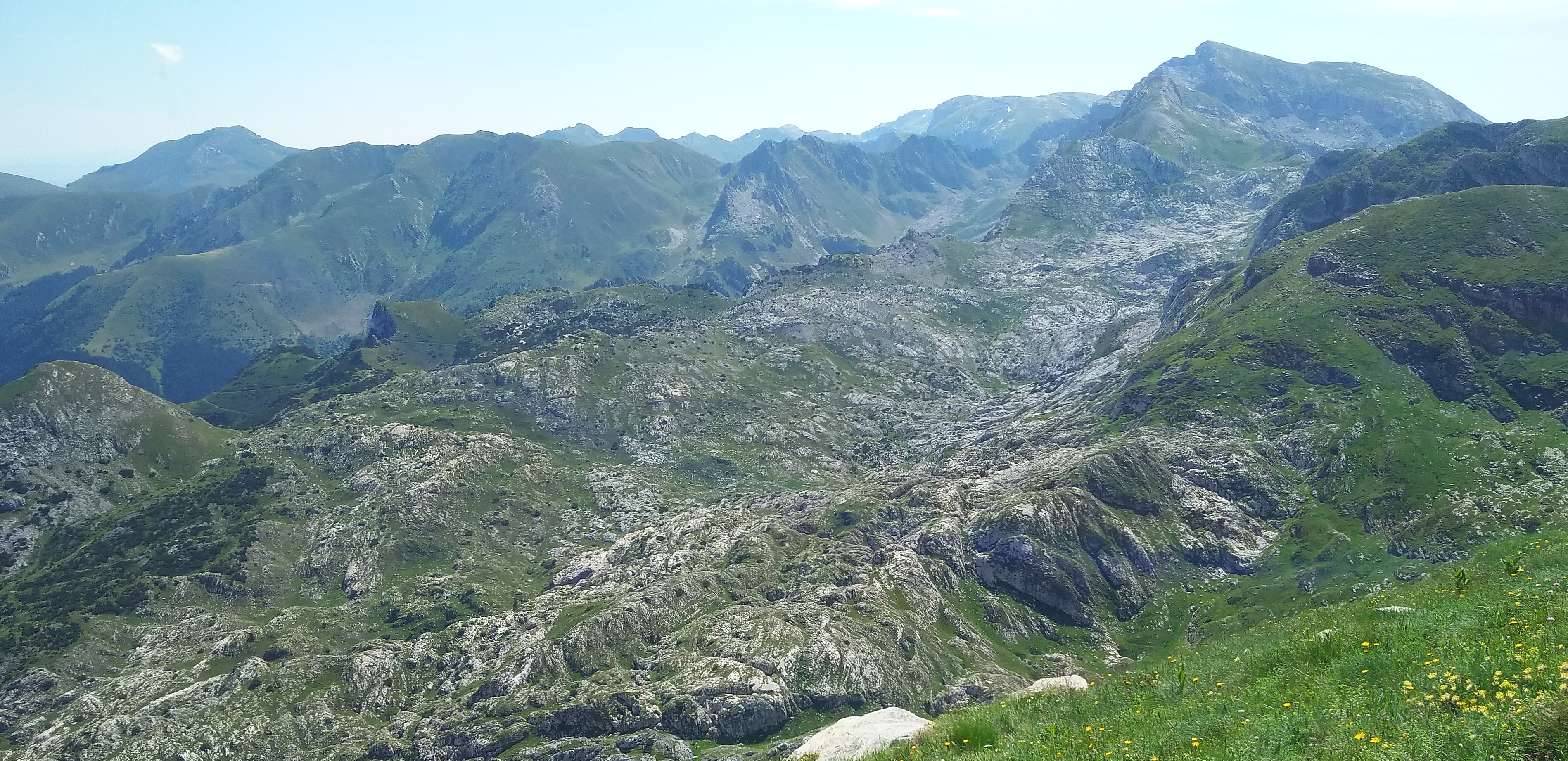 Conca delle Carsene e Marguareis da pendici cima della Fascia - Alpi LIguri